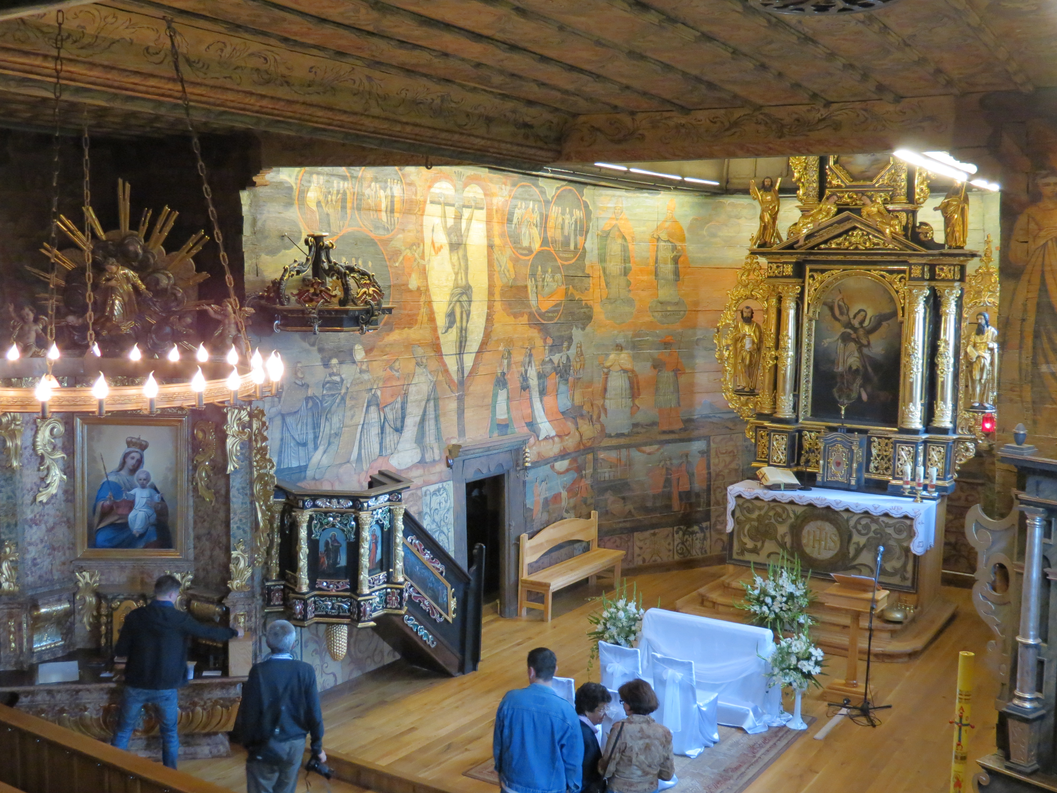 Kościół drewniany p. w. św. Michała Archanioła; Żernica, ul. Miki 3, gmina Pilchowice, powiat gliwicki